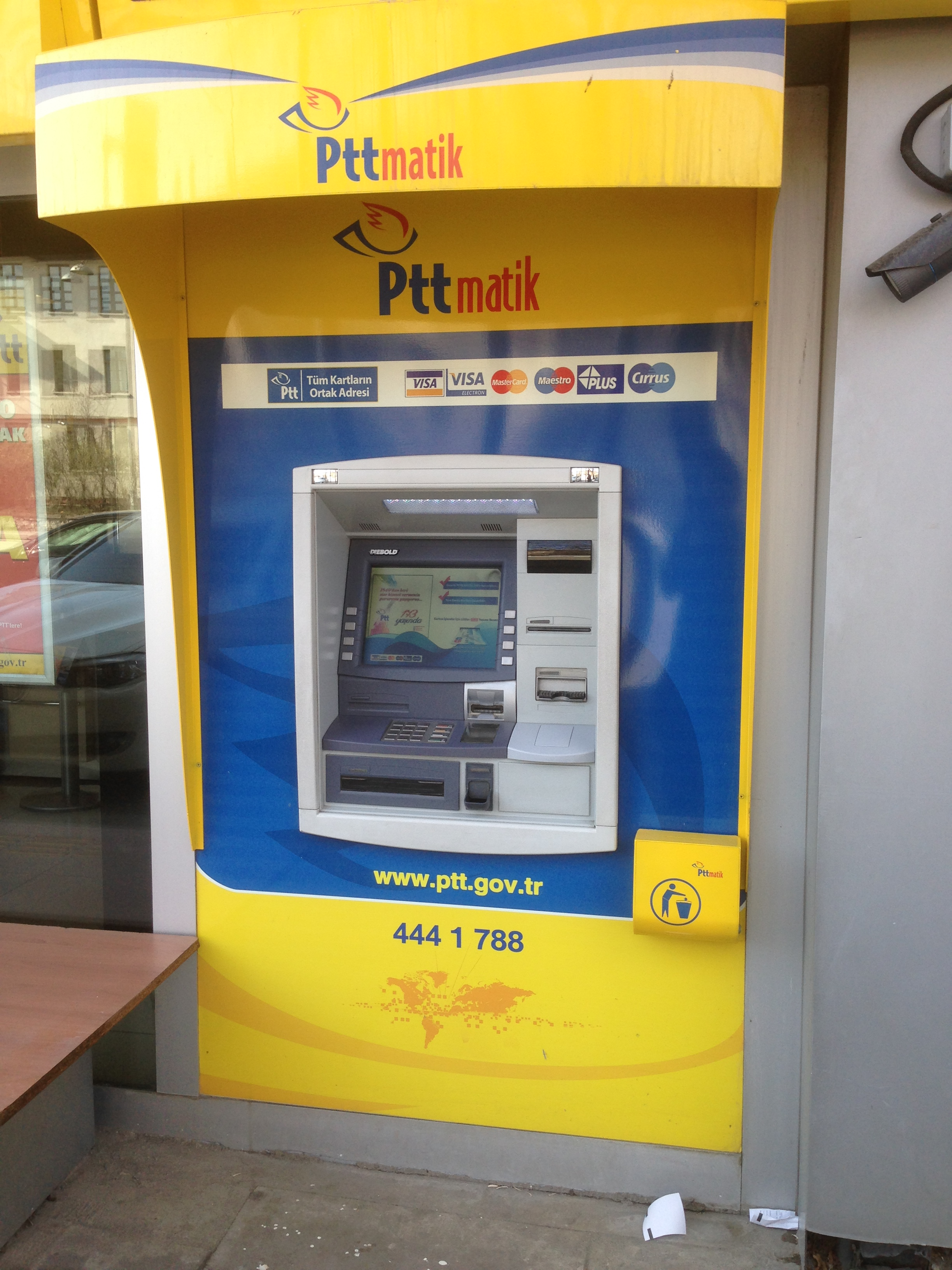 PTT atm